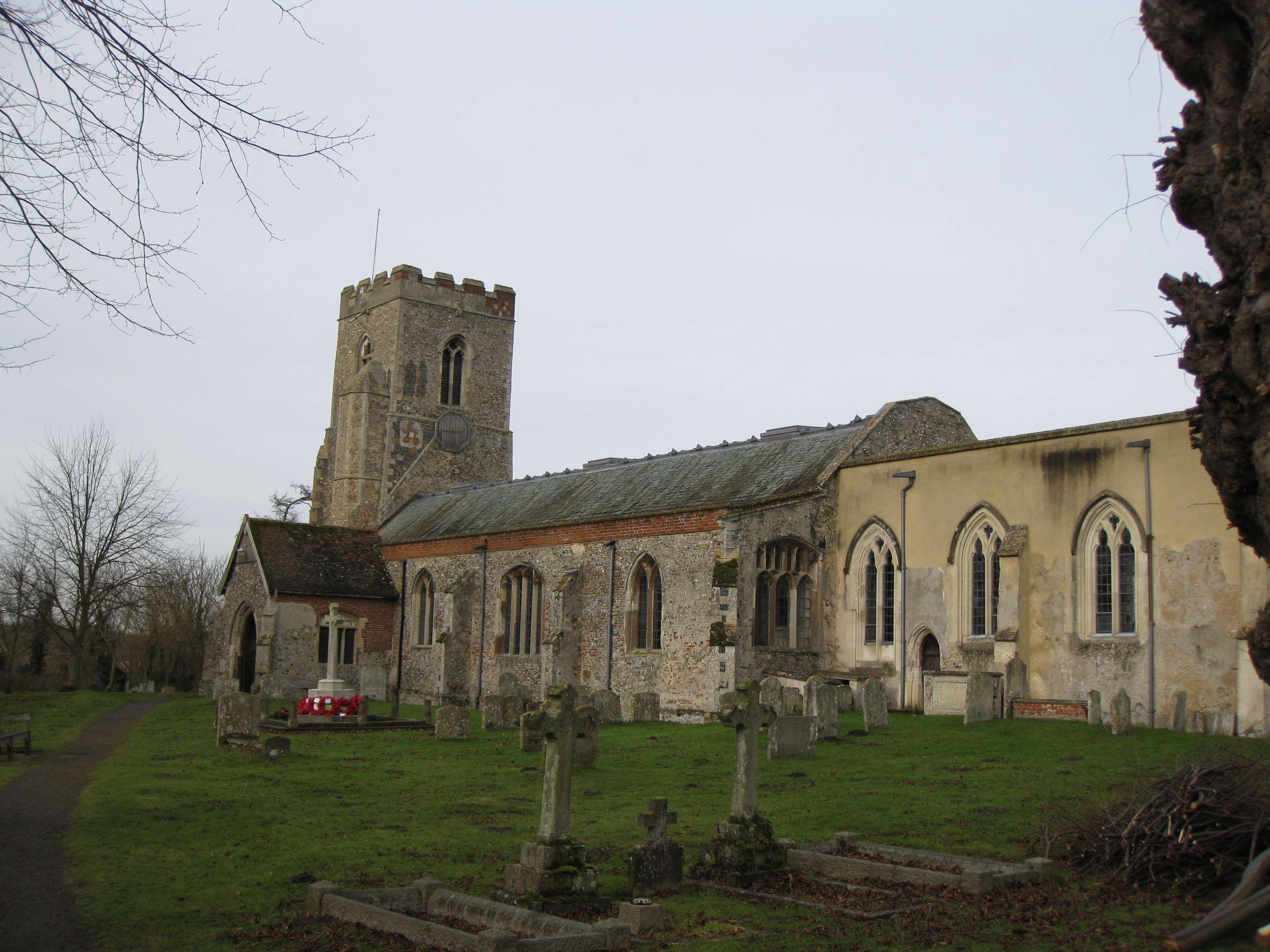 St Peter and St Paul, Kedington